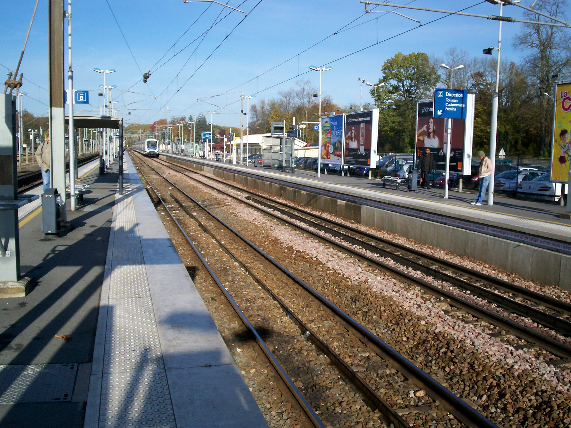 RER E - Gare de Gretz-Armainvilliers